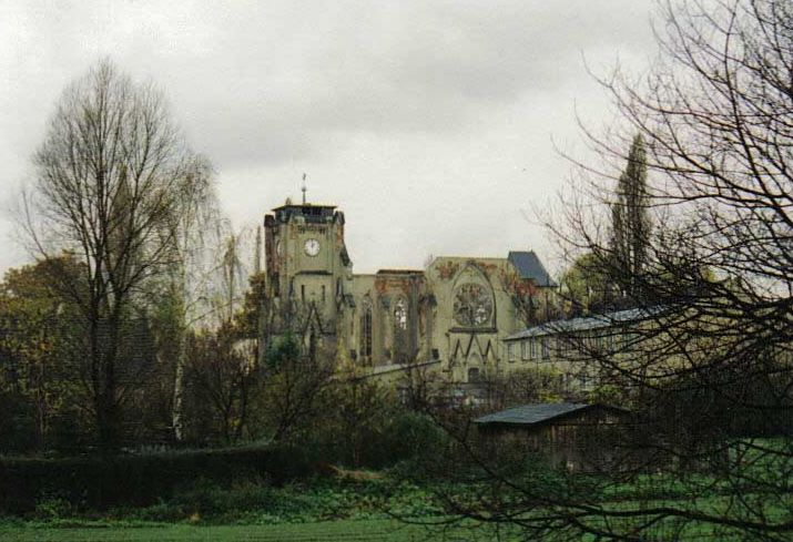 Kirchenruine von Wachau (b. Leipzig)